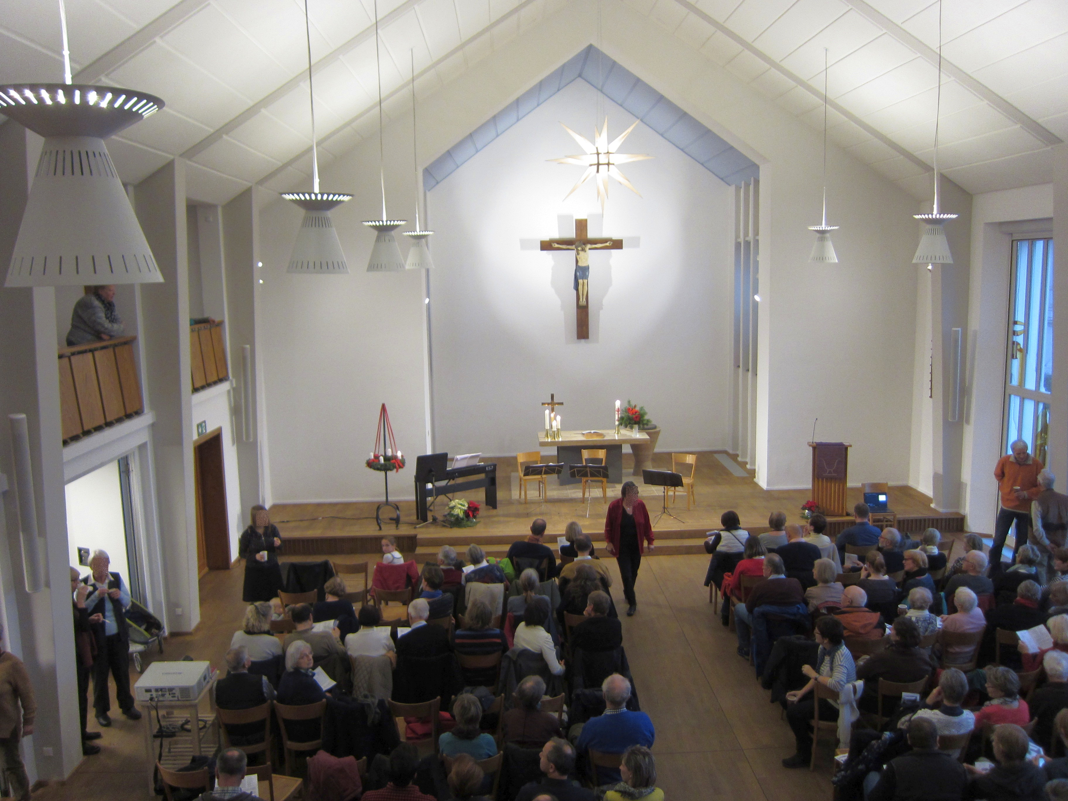 Weinbergskirche in Dresden-Trachenberge